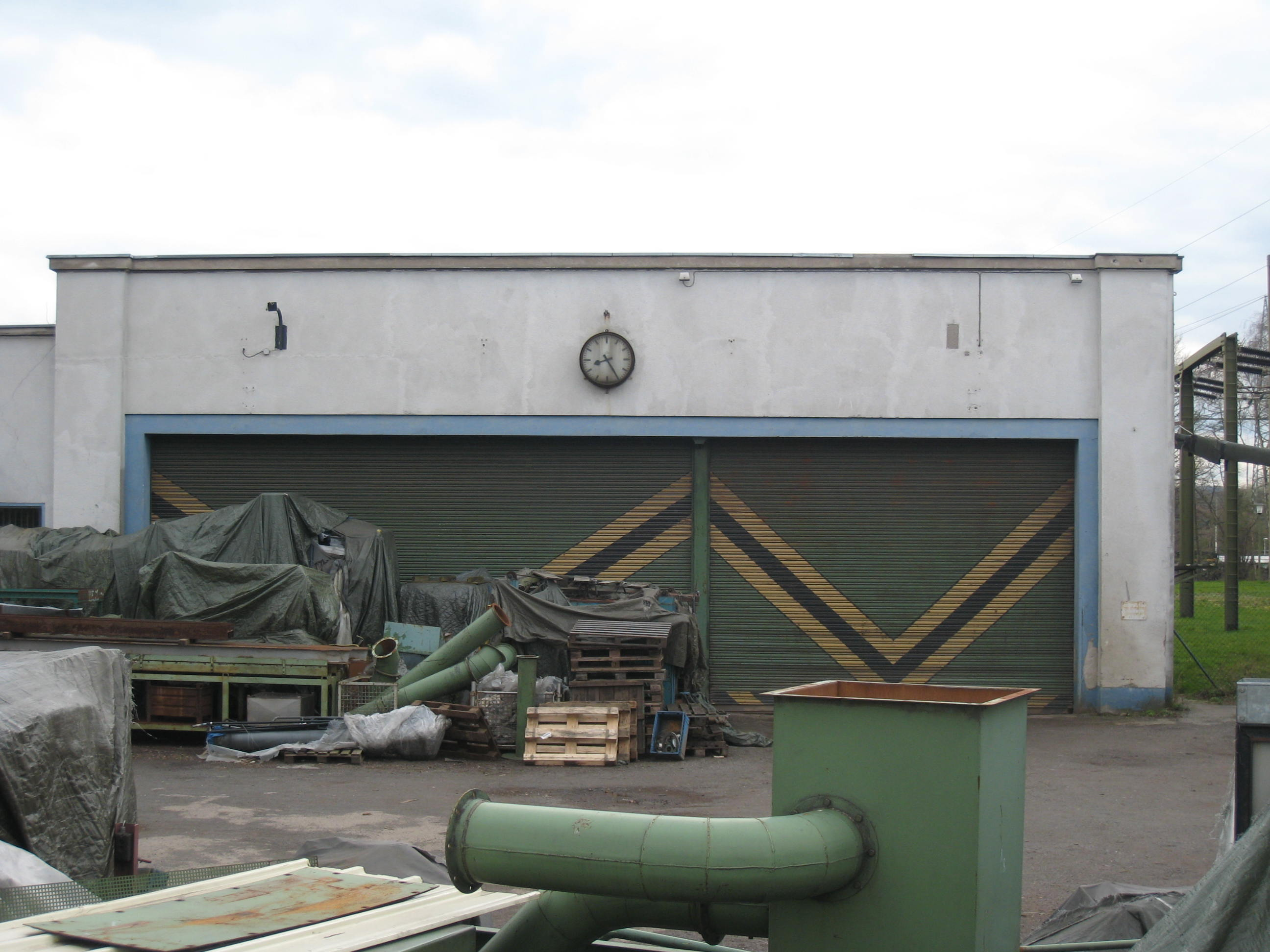 Betriebshof Kreisbahn Hörde